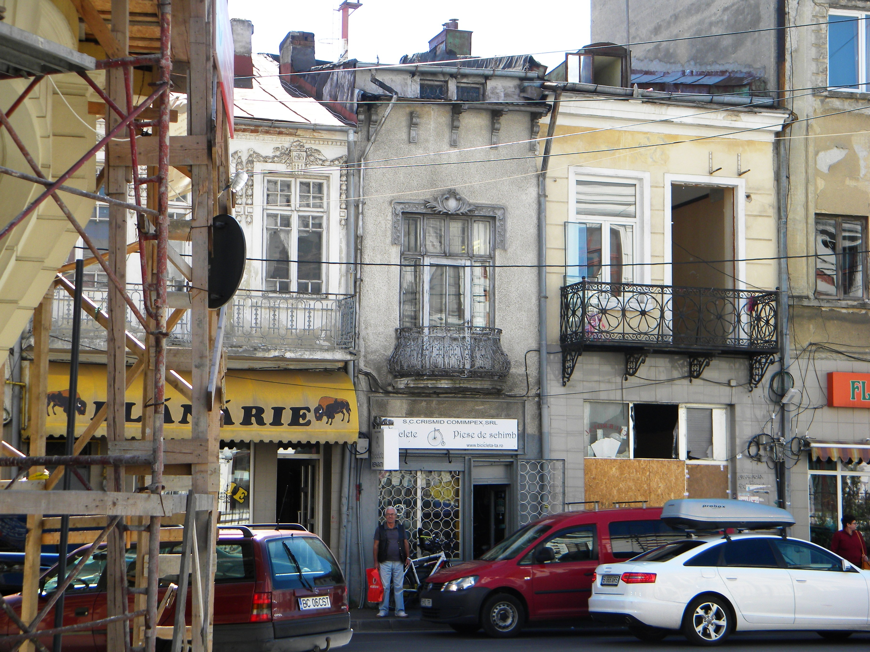 Bucuresti, Romania, Casa pe Str. Coltei nr. 18, sect. 3